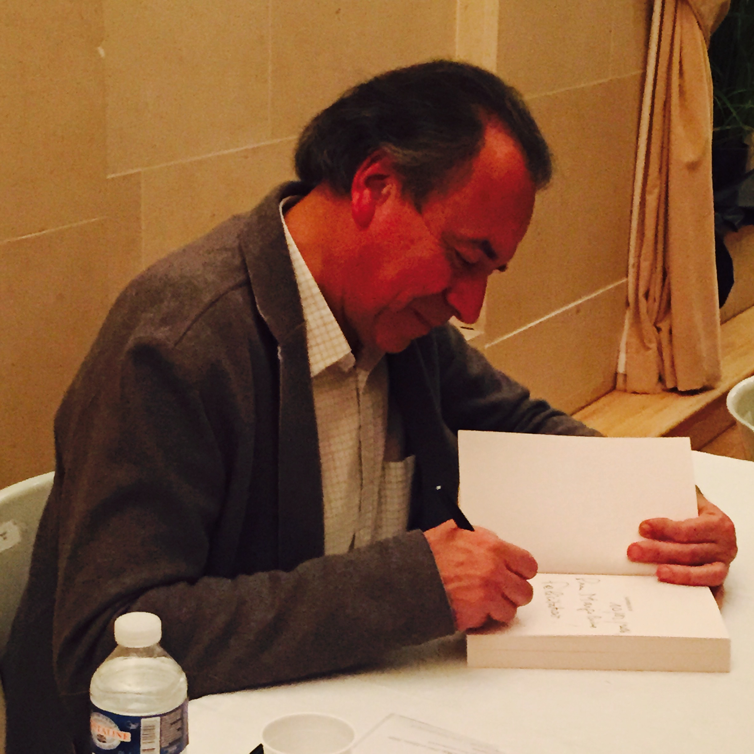 Pierre Durand en dédicace lors de la soirée des cavaliers lauréats du Val de Marne 2016 à l'orangerie du Château de Grosbois.